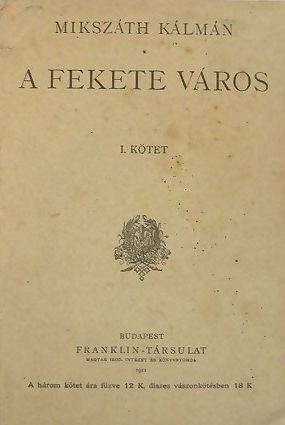 A fekete város című regény első kiadása.